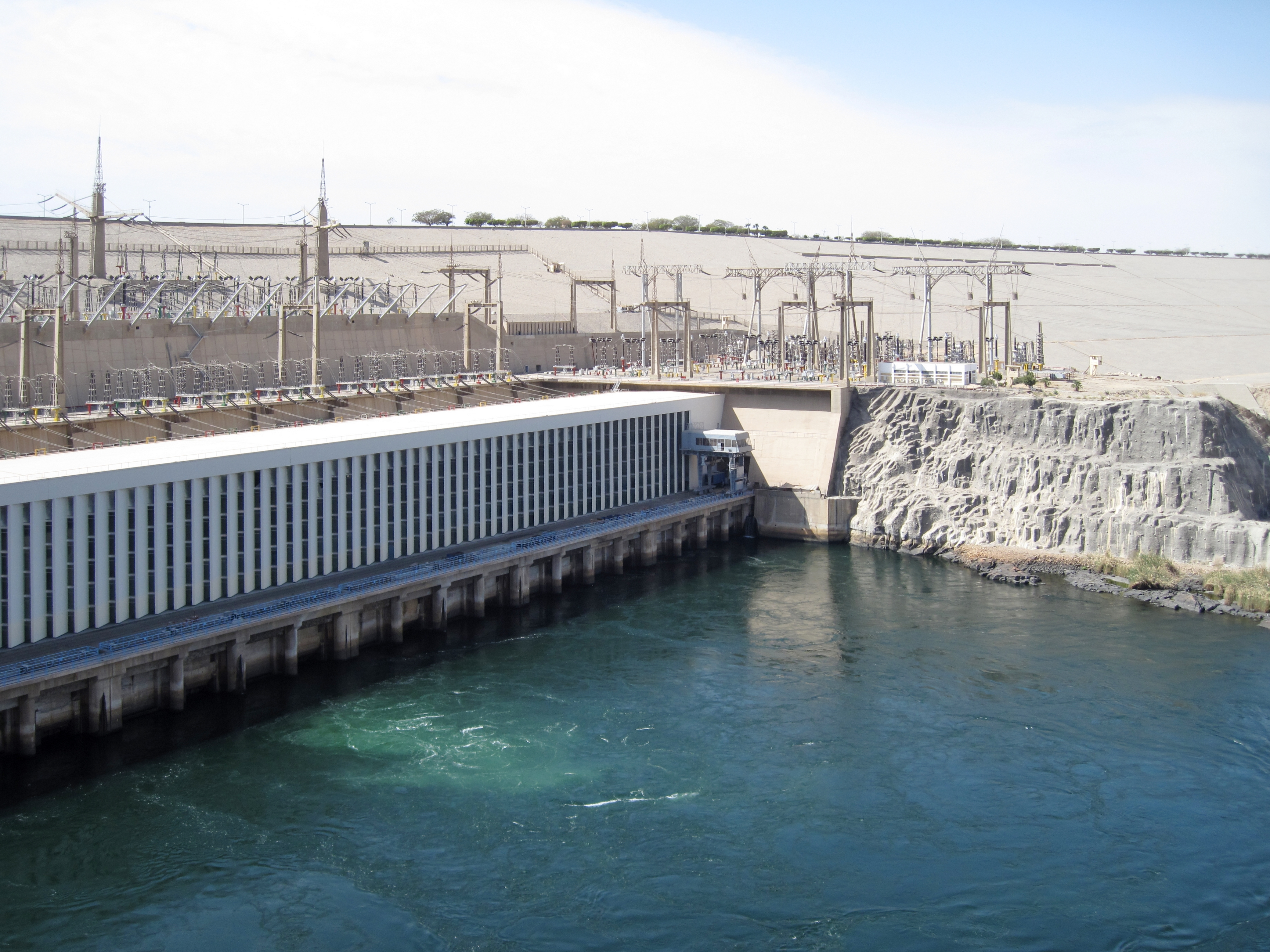 Nordseite des Assuan-Hochdamms, Ägypten